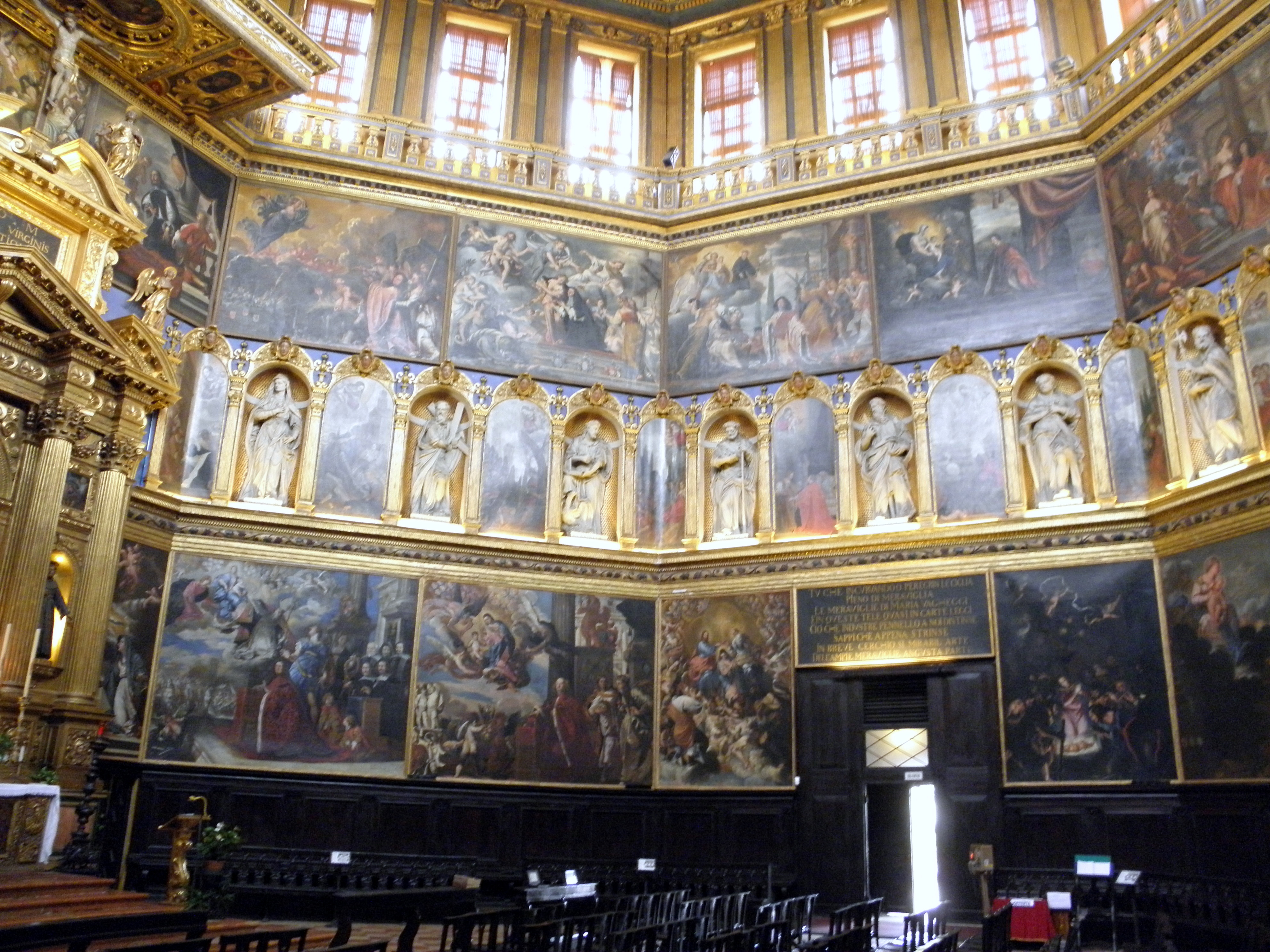 Rovigo, Chiesa della Beata Vergine del Soccorso detta "La Rotonda": interno, vista generale della parete sul lato destro, quello in direzione Piazza XX Settembre.